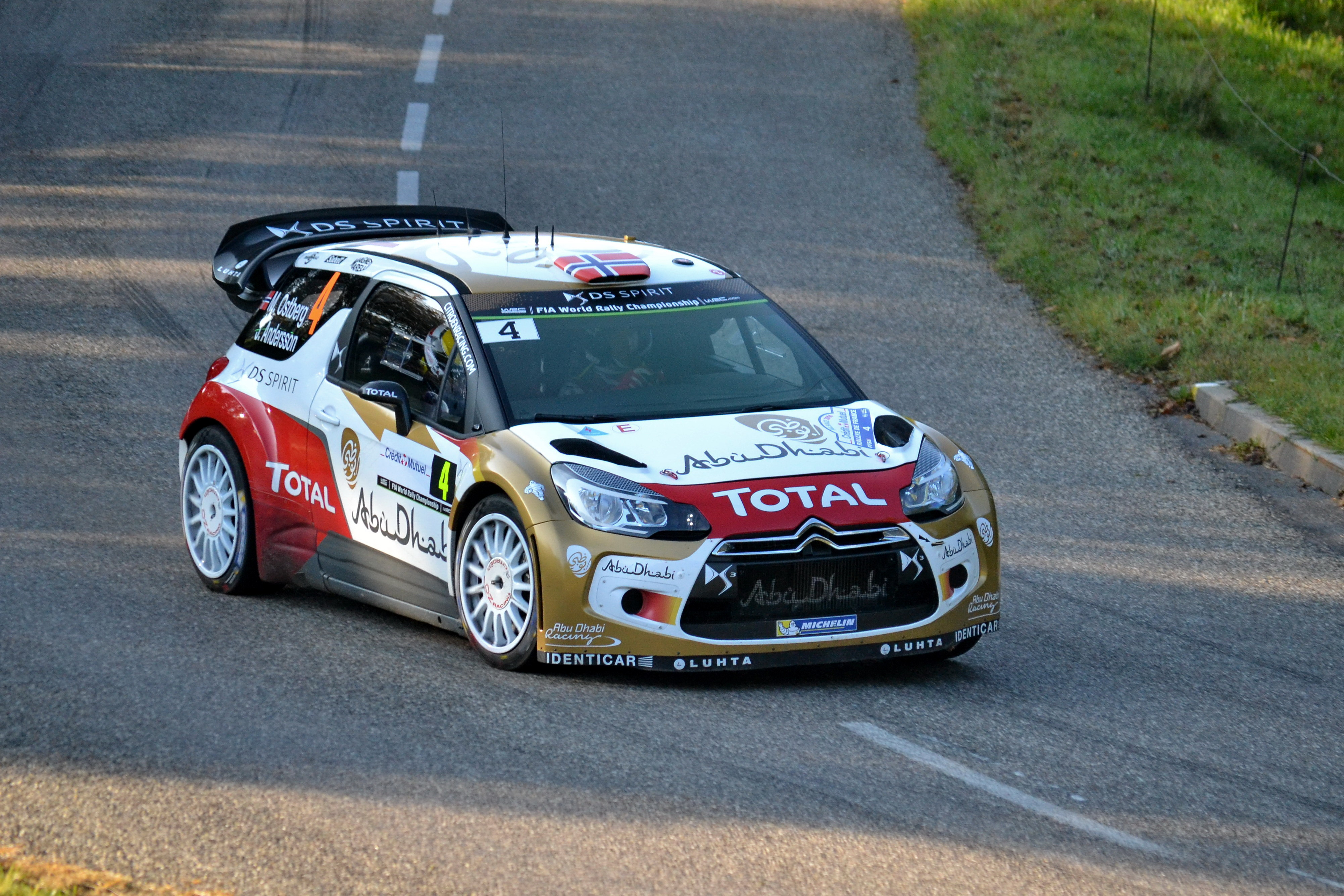 Rallye WRC France-Alsace 2014, ES9 Soultzeren - Le Grand Hohnack 1 à Labaroche. Citroên DS3 WRC - Mads Østberg - Jonas Andersson